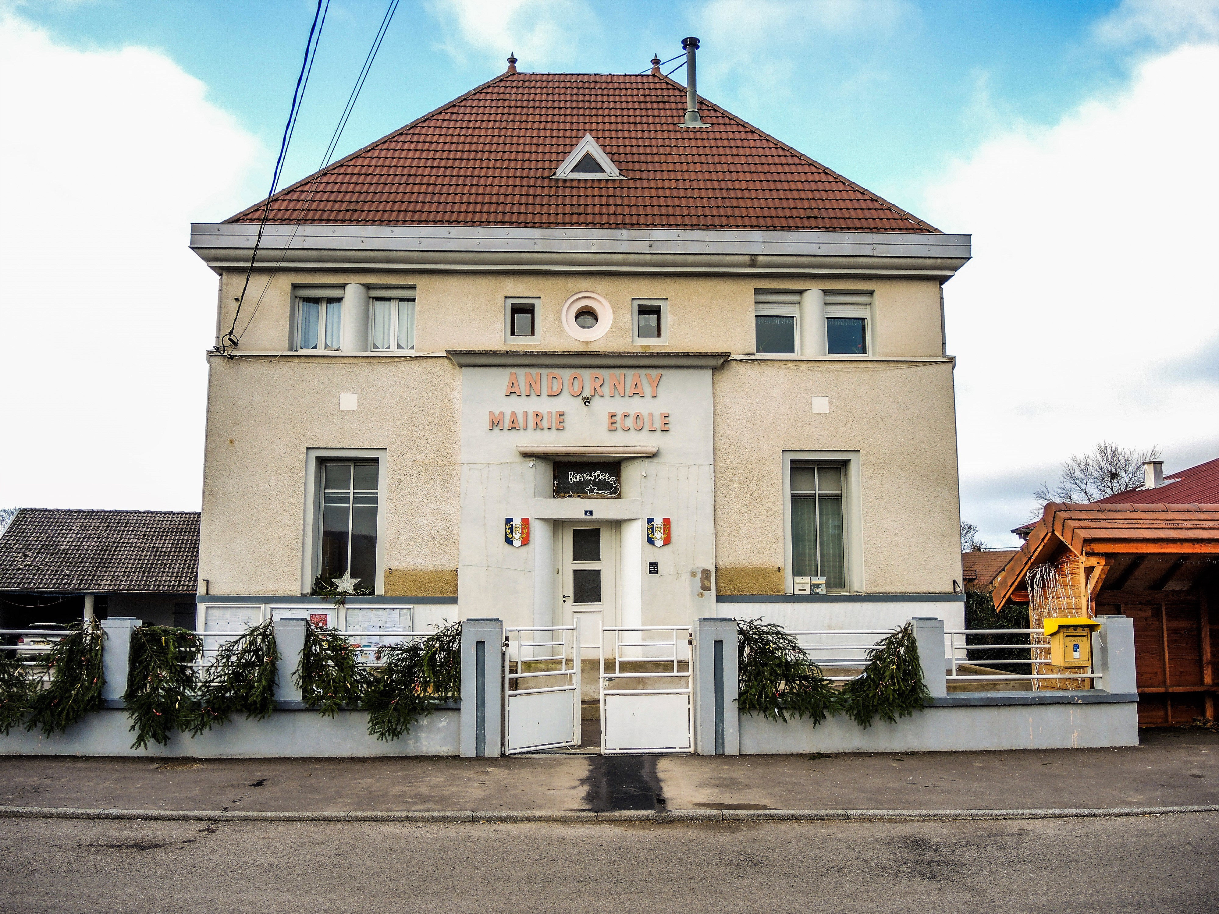 Façade de la mairie d'Andornay. Haute-Saône